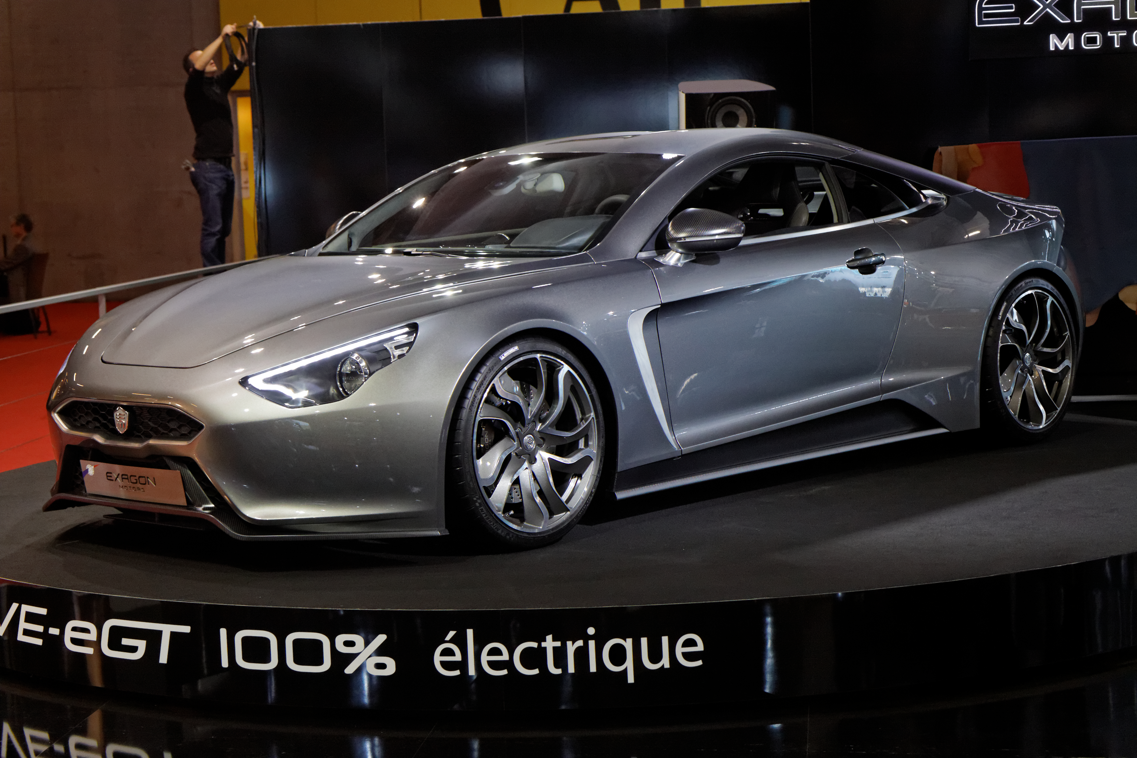 Une Exagon Furtive eGt présentée lors du Mondial de l'automobile de Paris 2012.